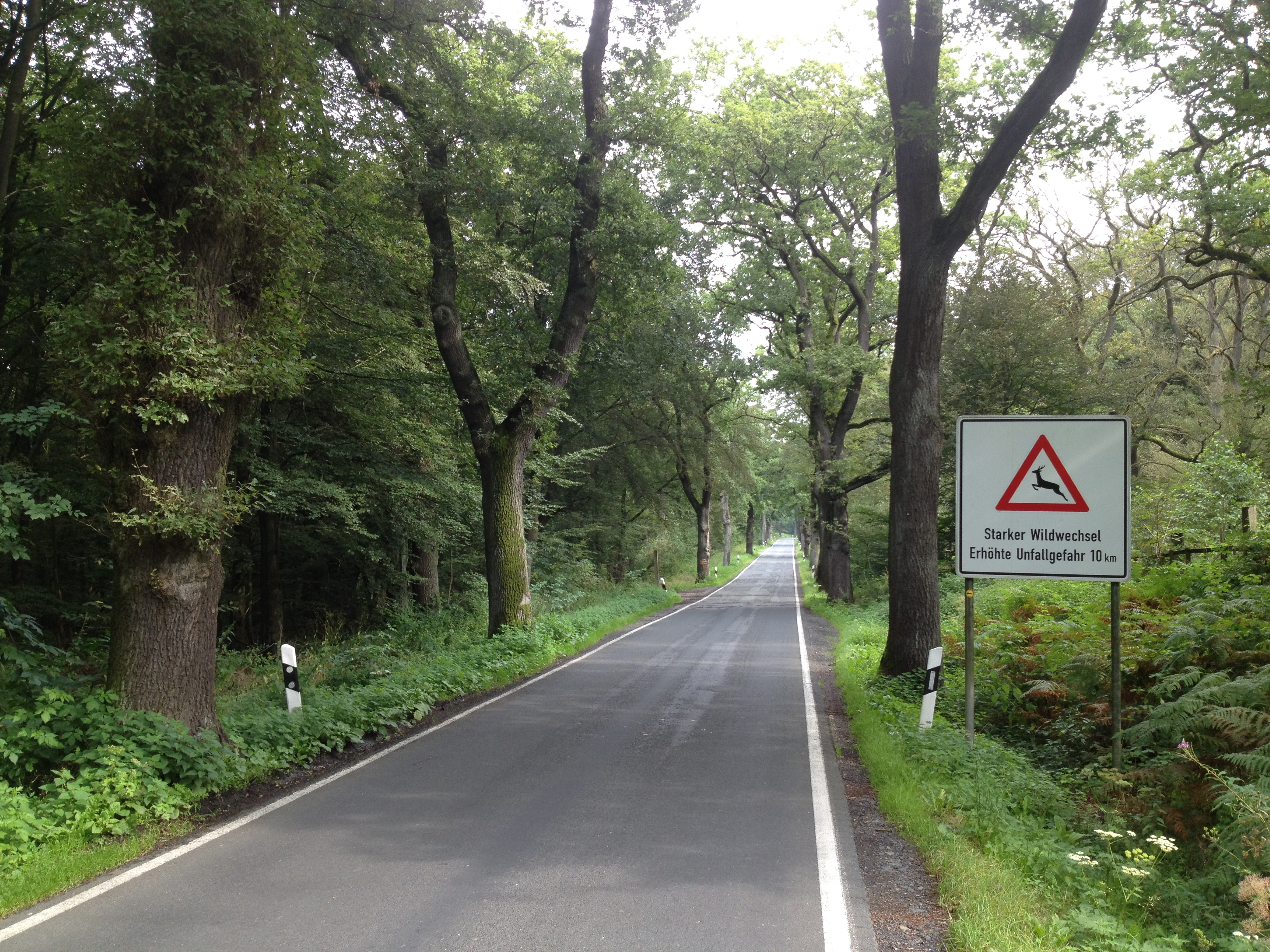 Der Reinhardswaldweg zwischen Ahlberg und Hombressen auf der Landesstraße 3229 unweit des Forsthaus Mariendorf